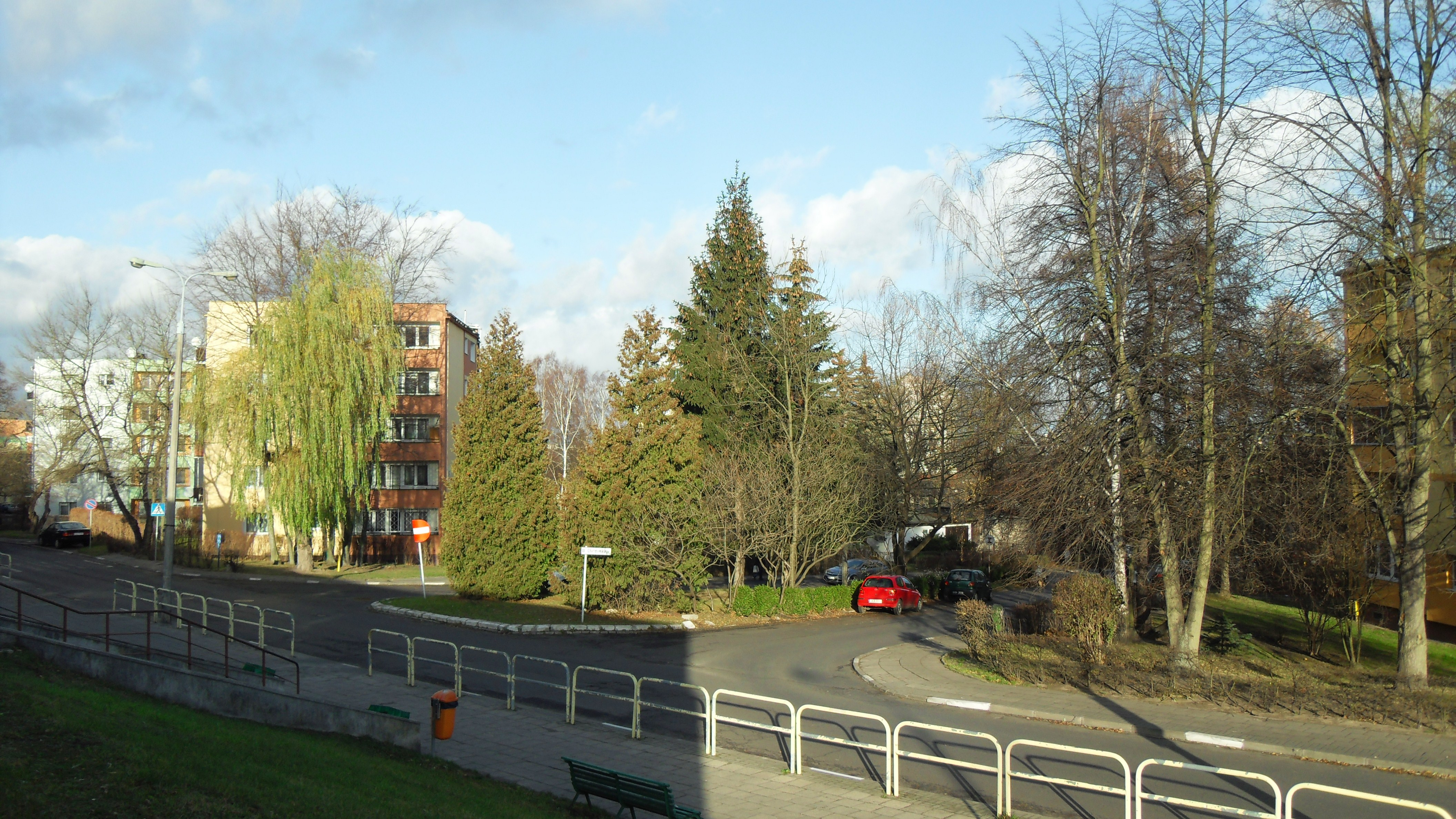 Gdańsk VII Dwór. Na pierwszym planie ul. Norblina, skrzyżowanie z ul. Chełmońskiego.